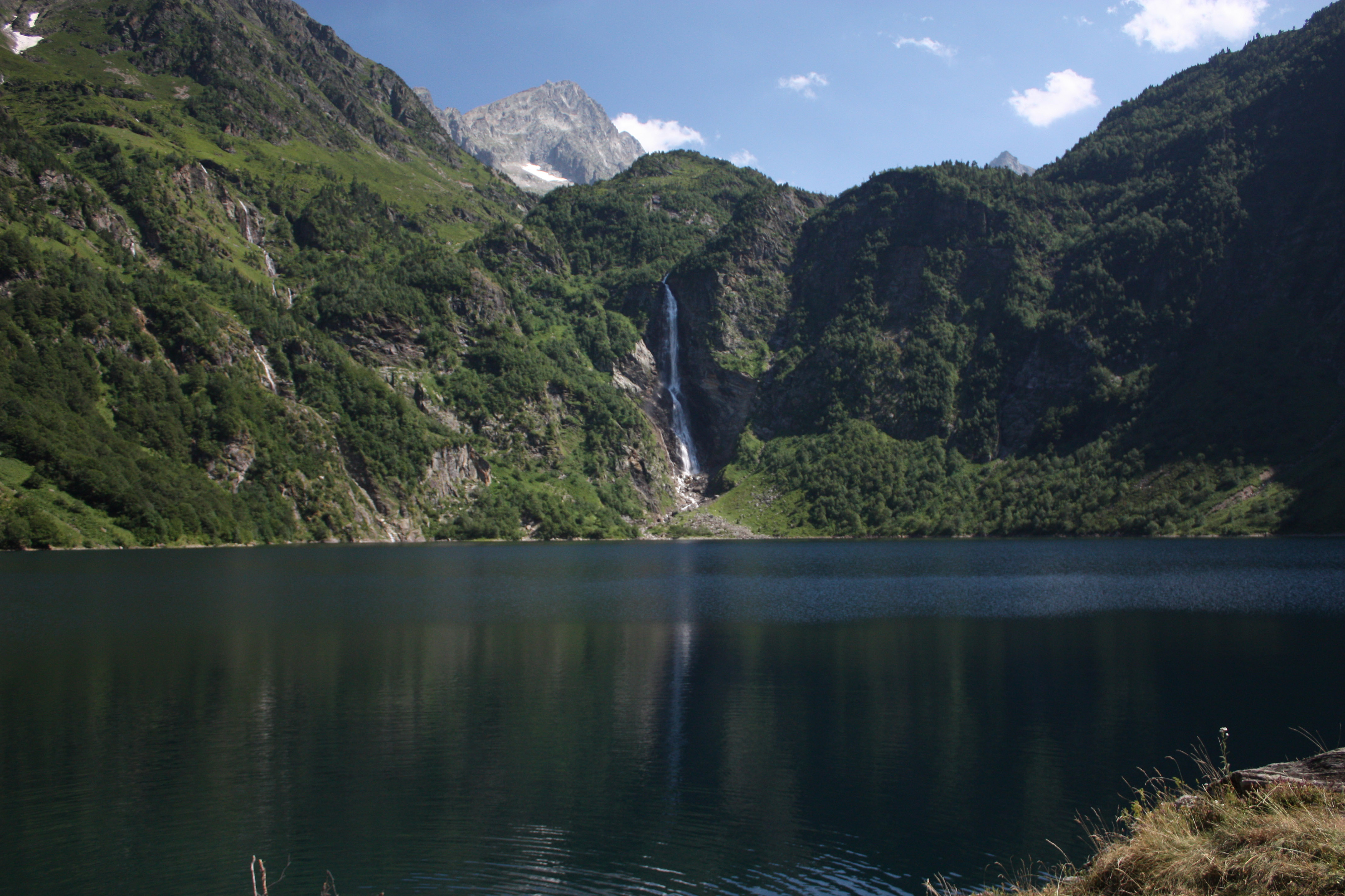 Oô lake.